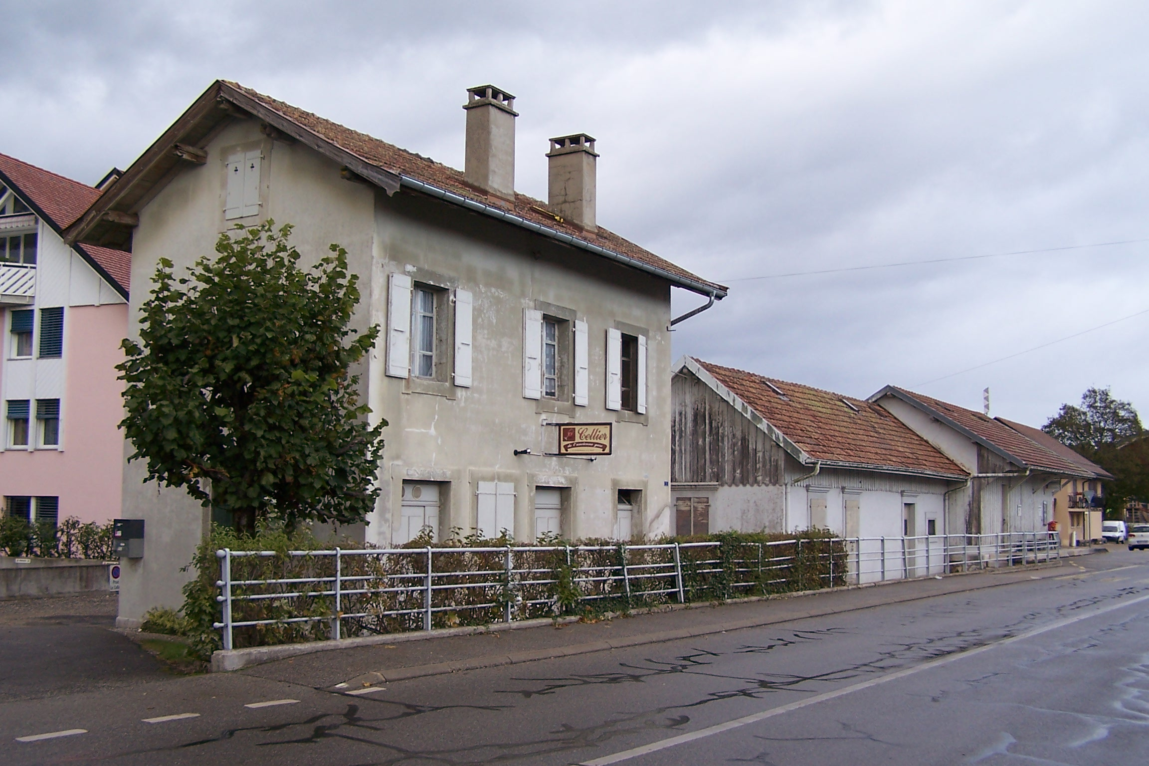 Ehemaliger Bahnhof Crassier-La Rippe an der abgebauten Bahnstrecke Nyon–Crassier.